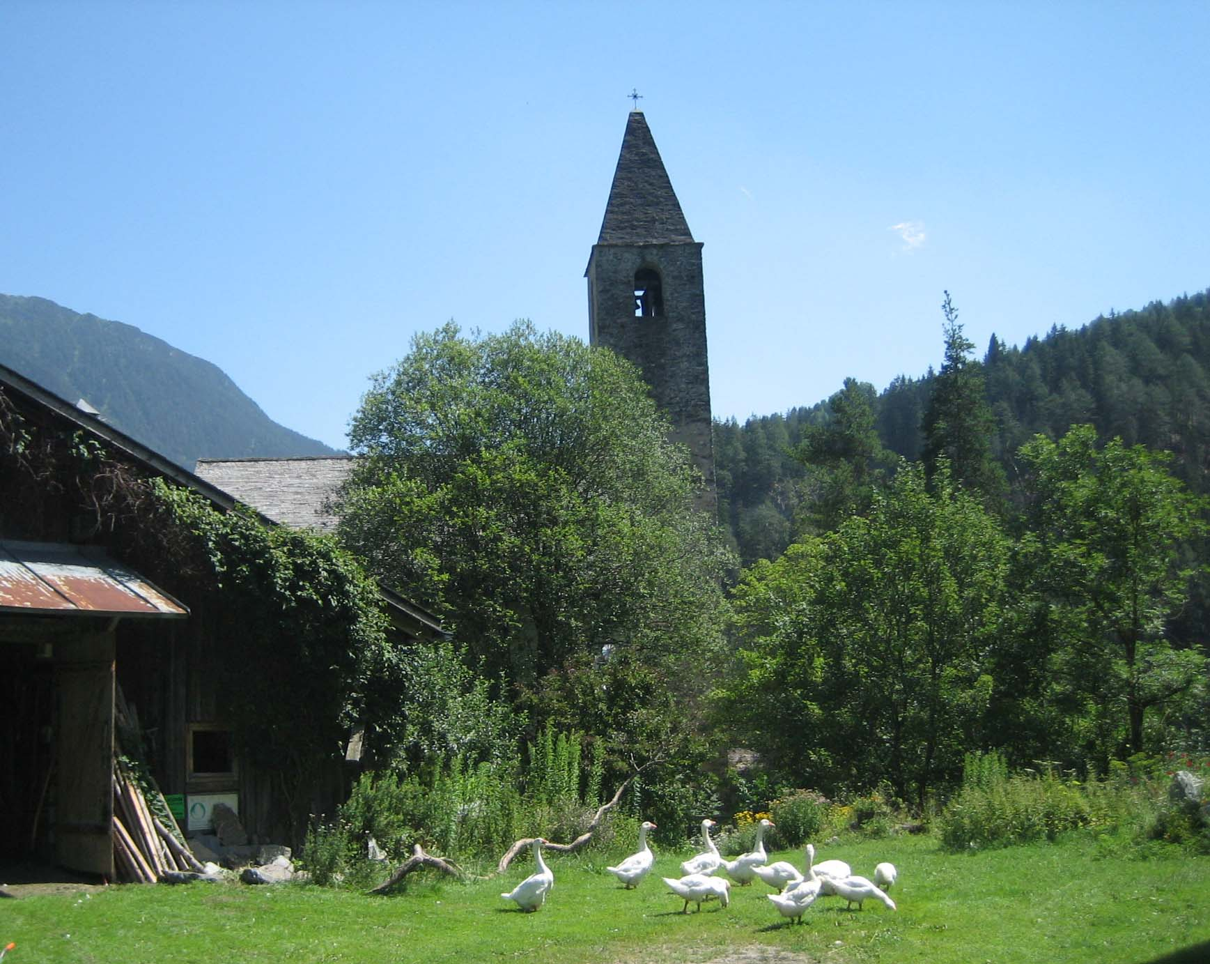 Lage